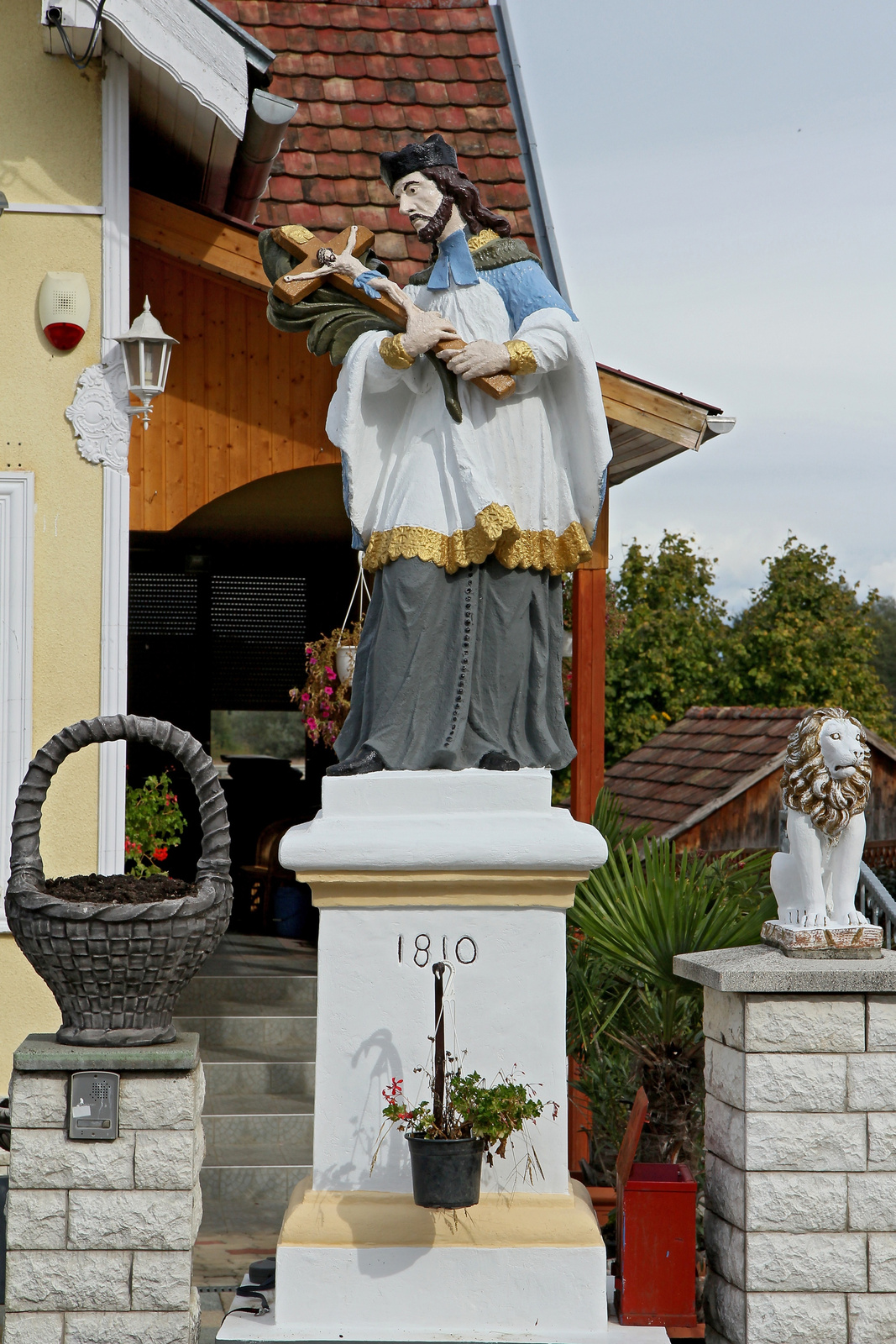 Nep. Szt. János szobor (Zalalövő, Kolozsvári u. 4.) This is a photo of a monument in Hungary, Identifier: 12855